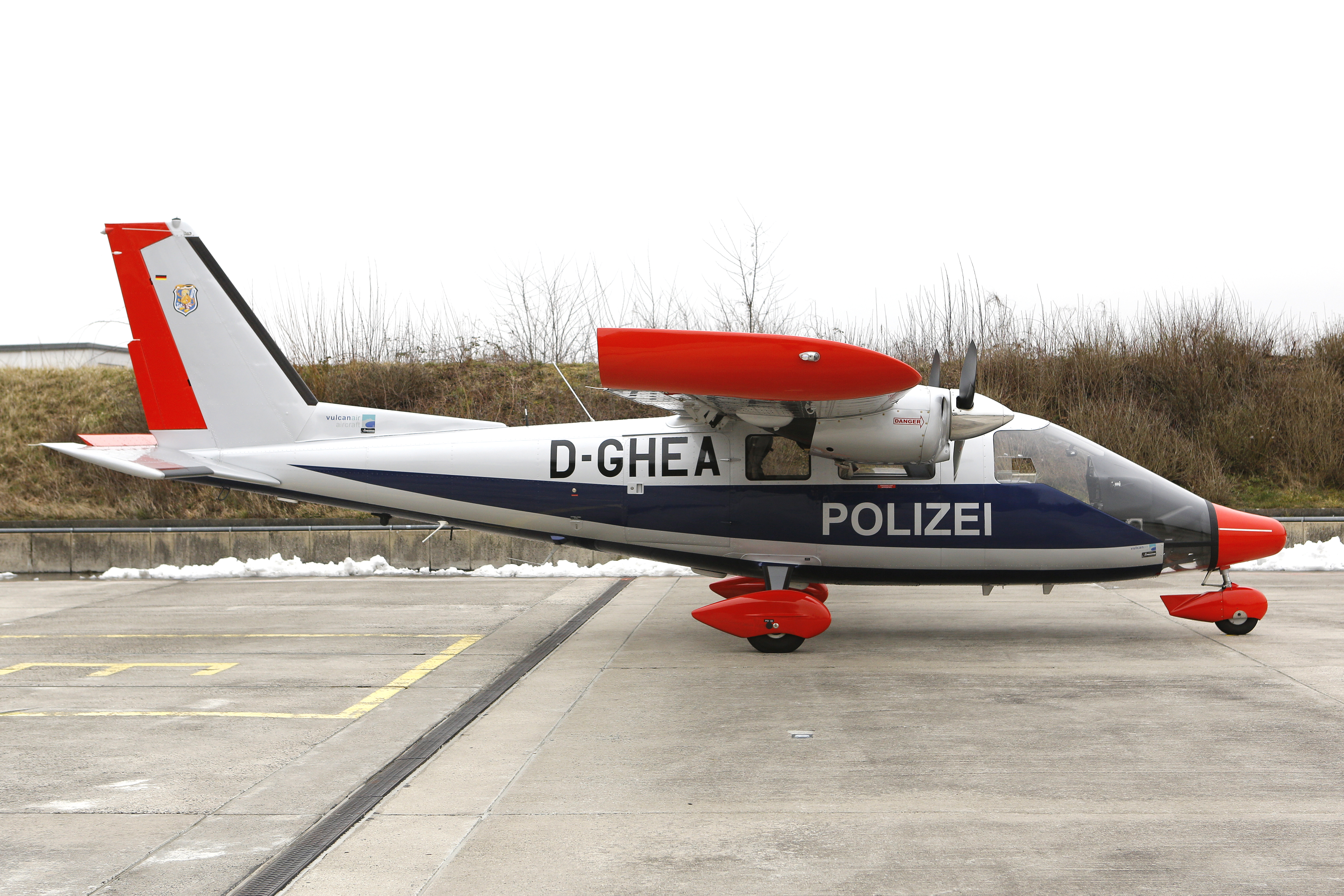 Vulcanair P68 Observer 2 als Polizeiflugzeug "Ibis 7" (D-GHEA) der hessischen Polizeifliegerstaffel am Flugplatz Egelsbach.